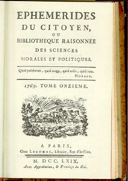 Ephemerides du citoyen 1769